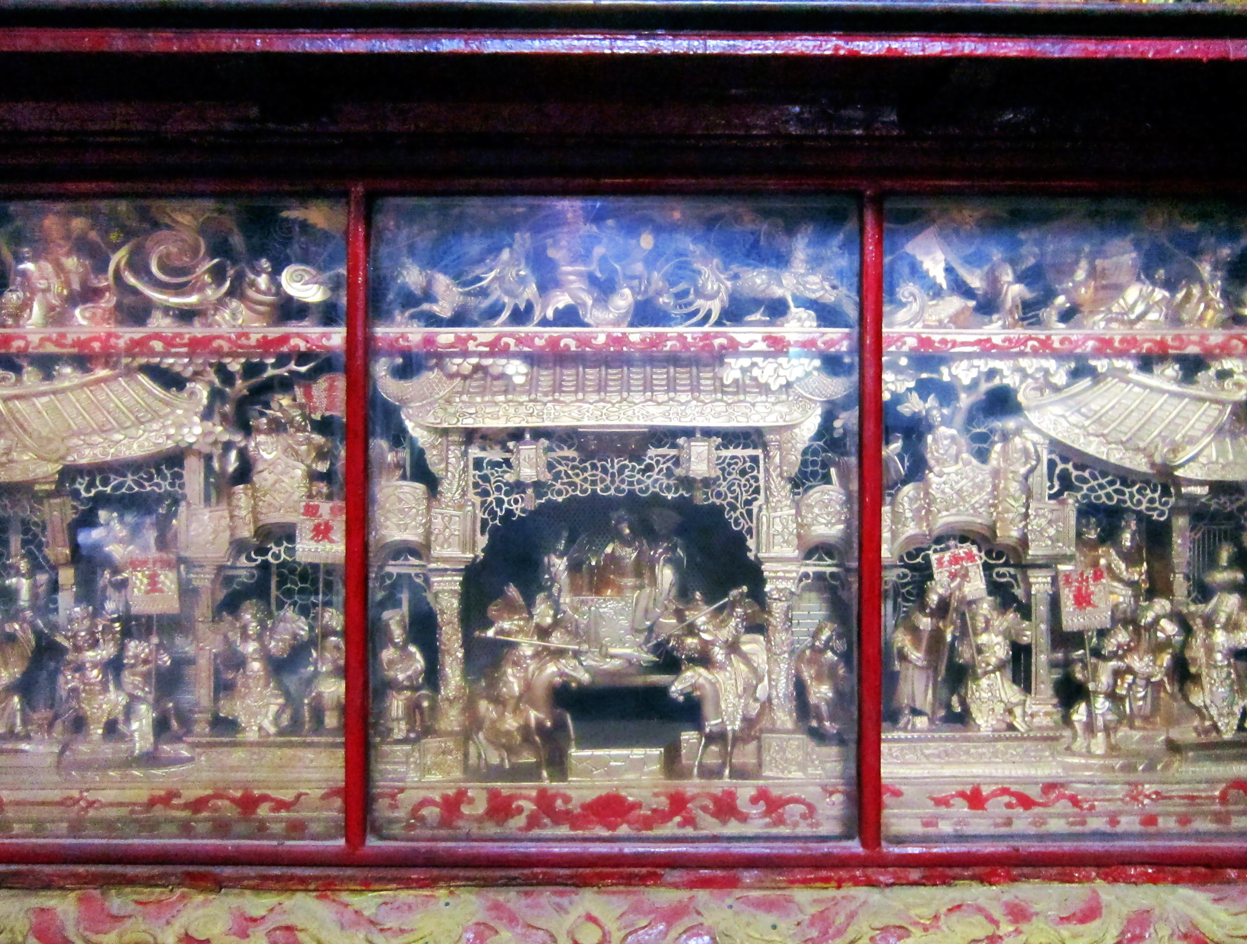 Phù điêu trong Chùa Ông; tọa lạc tại số 32 đường Hai Bà Trưng, thuộc phường Tân An, quận Ninh Kiều, thành phố Cần Thơ, Việt Nam.